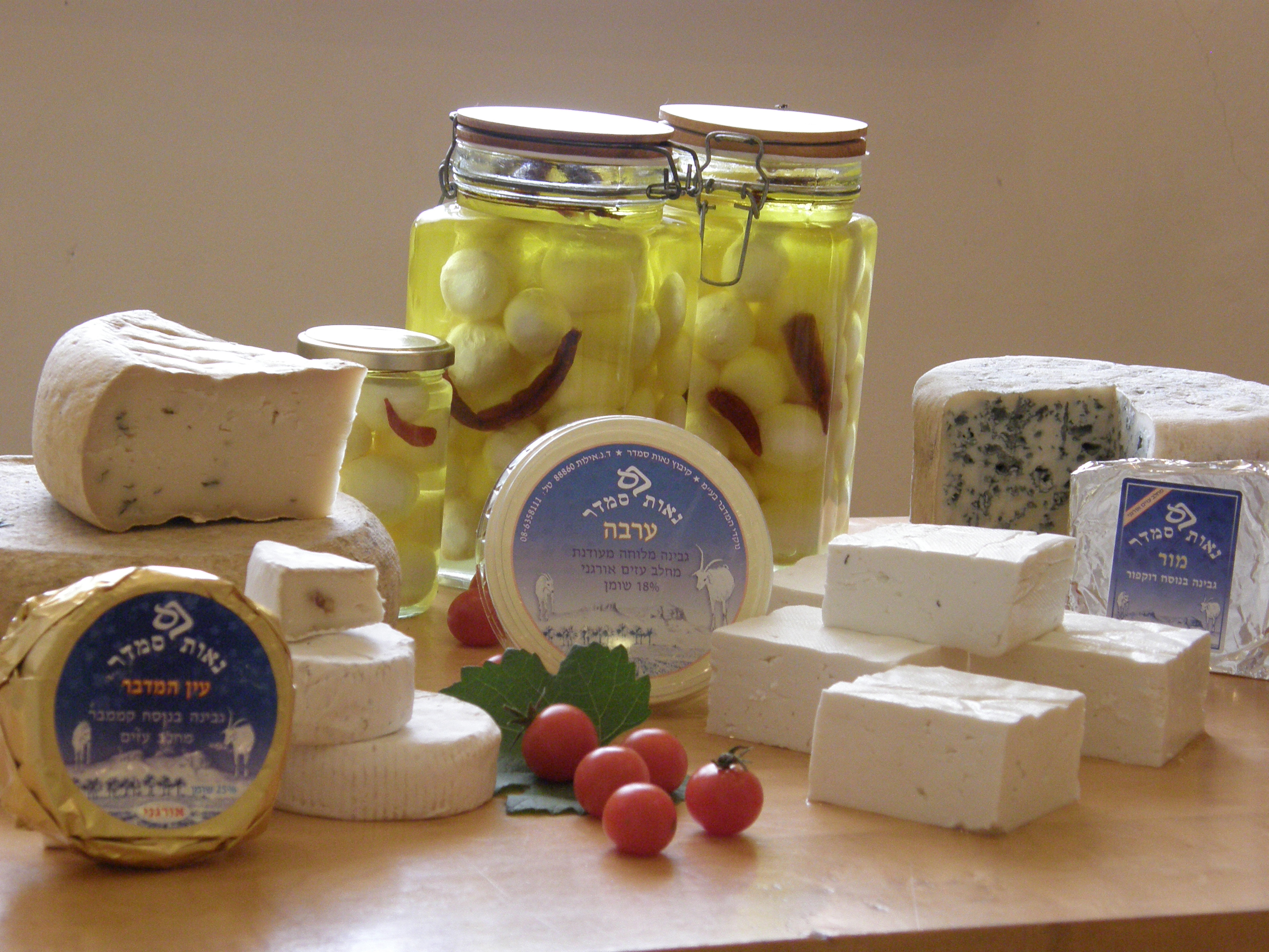 מבחר מוצרי מחלבת נאות סמדר - כל המוצרים מקורם בחלב עזים אורגני של דיר נאות סמדר